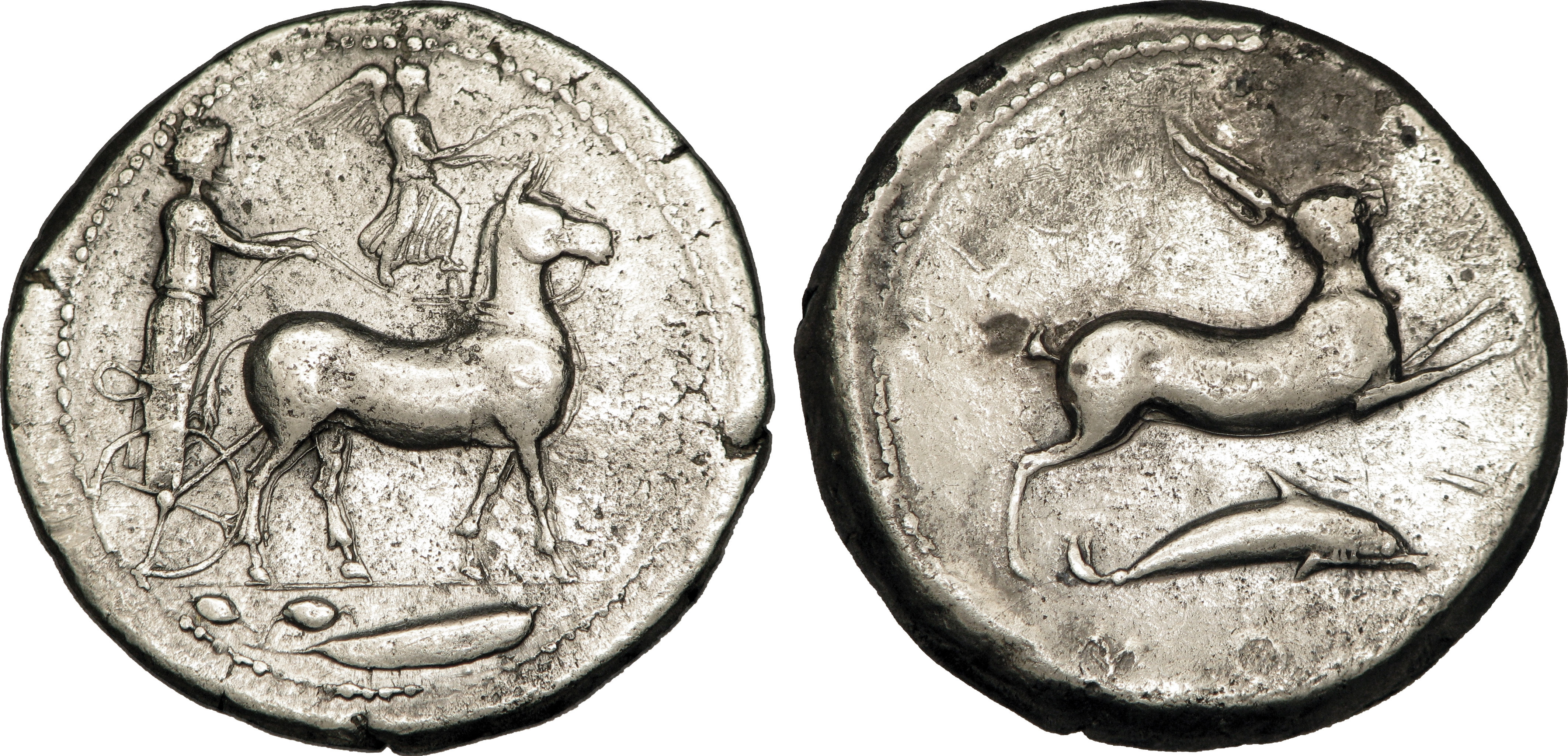 Nom de l'atelier : Sicile, Messine Métal : argent Diamètre : 25,5mm Axe des coins : 11h. Poids : 16,94g. Titulature avers : Anépigraphe. Description avers : Char tiré par une mule à droite, conduit par un aurige, tenant les rênes et le kentron, couronné par Niké marchant à droite au-dessus du bige ; à l'exergue, une feuille d'olivier ; grènetis circulaire perlé. Description revers : Lièvre bondissant à droite ; sous le lièvre, un dauphin à droite ; grènetis ciruclaire perlé. Légende revers : MESSAN-I-ON Traduction revers : (de Messine).